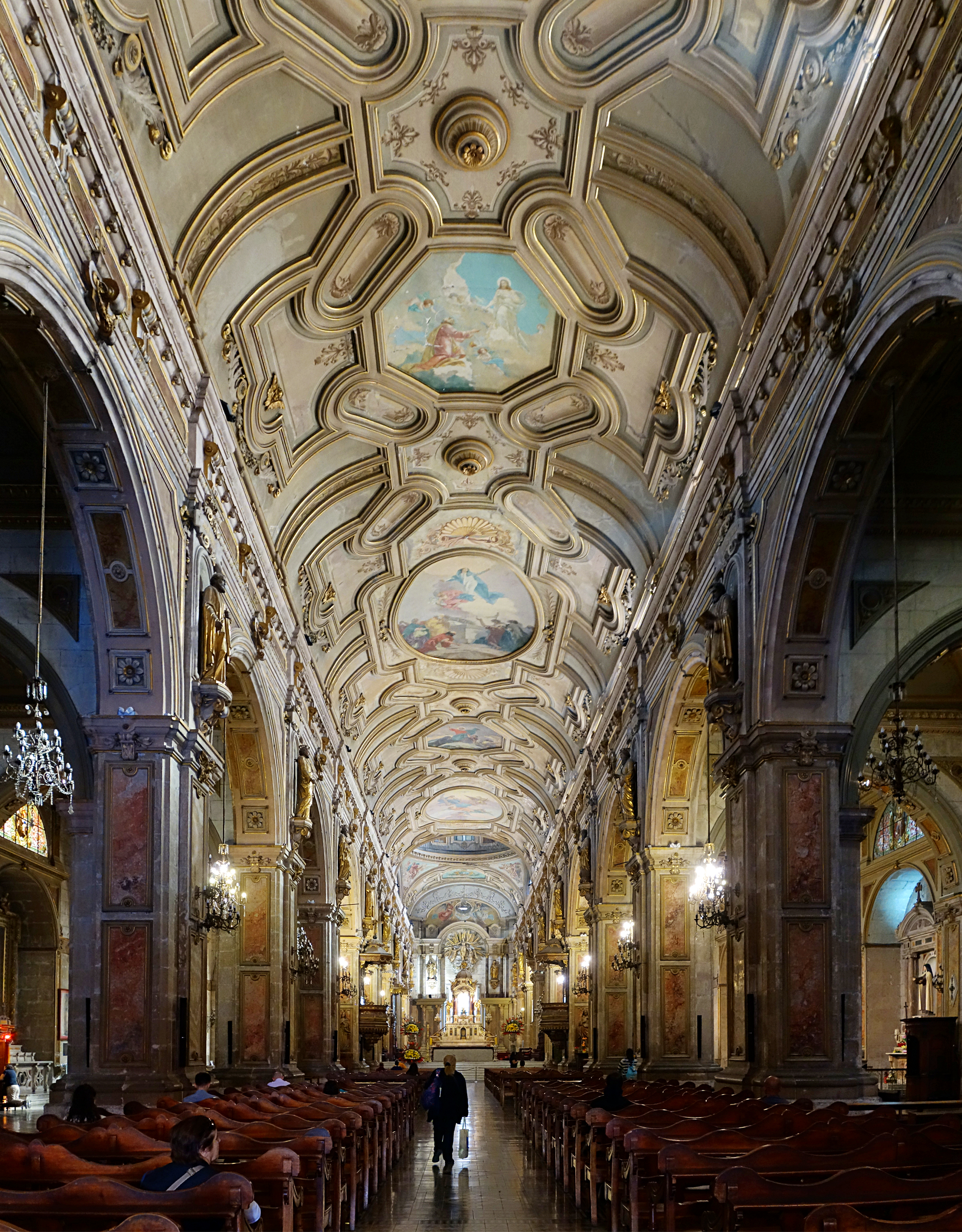 Nef de la cathédrale métropolitaine de Santiago